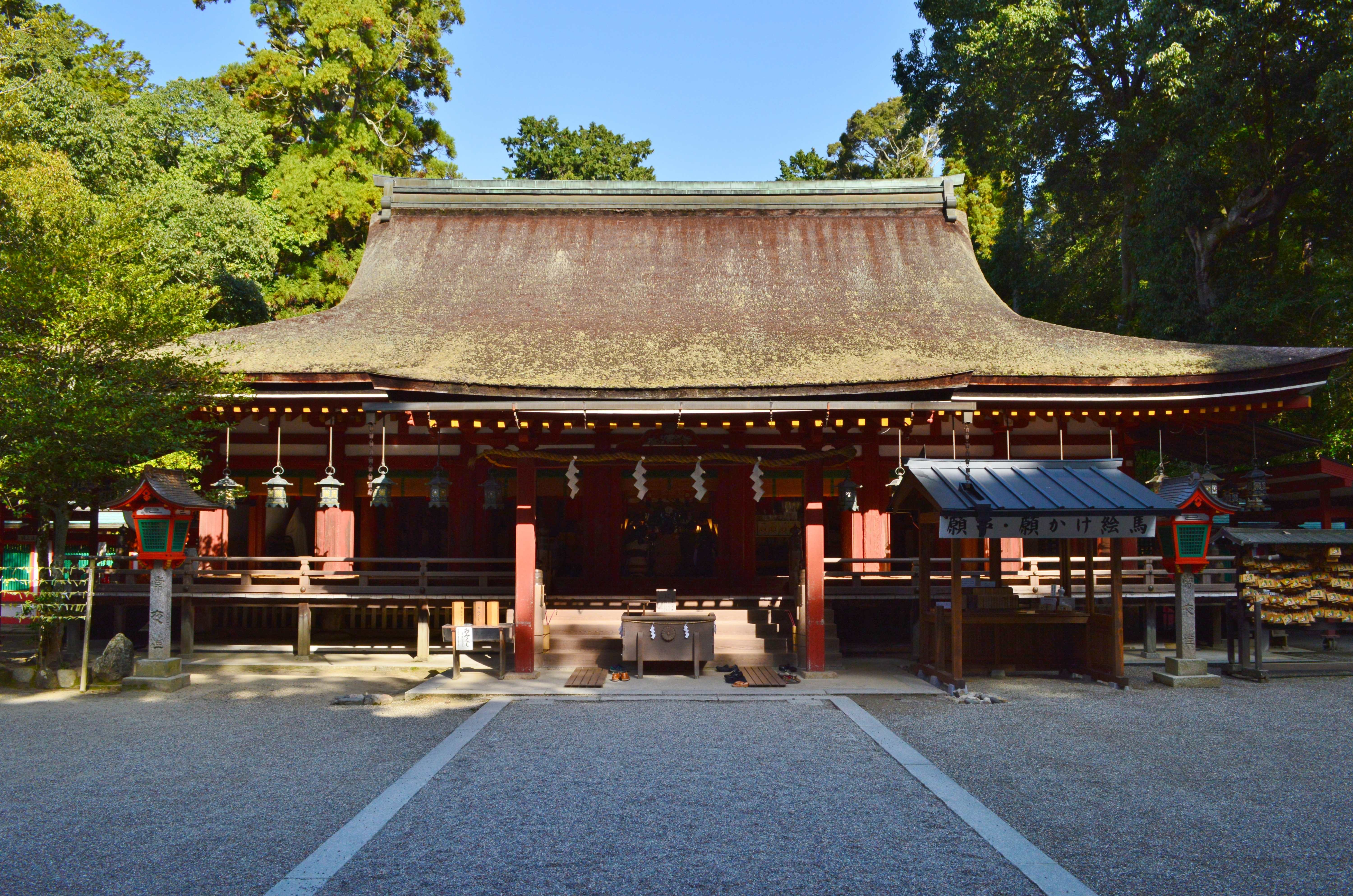 石上神宮 拝殿